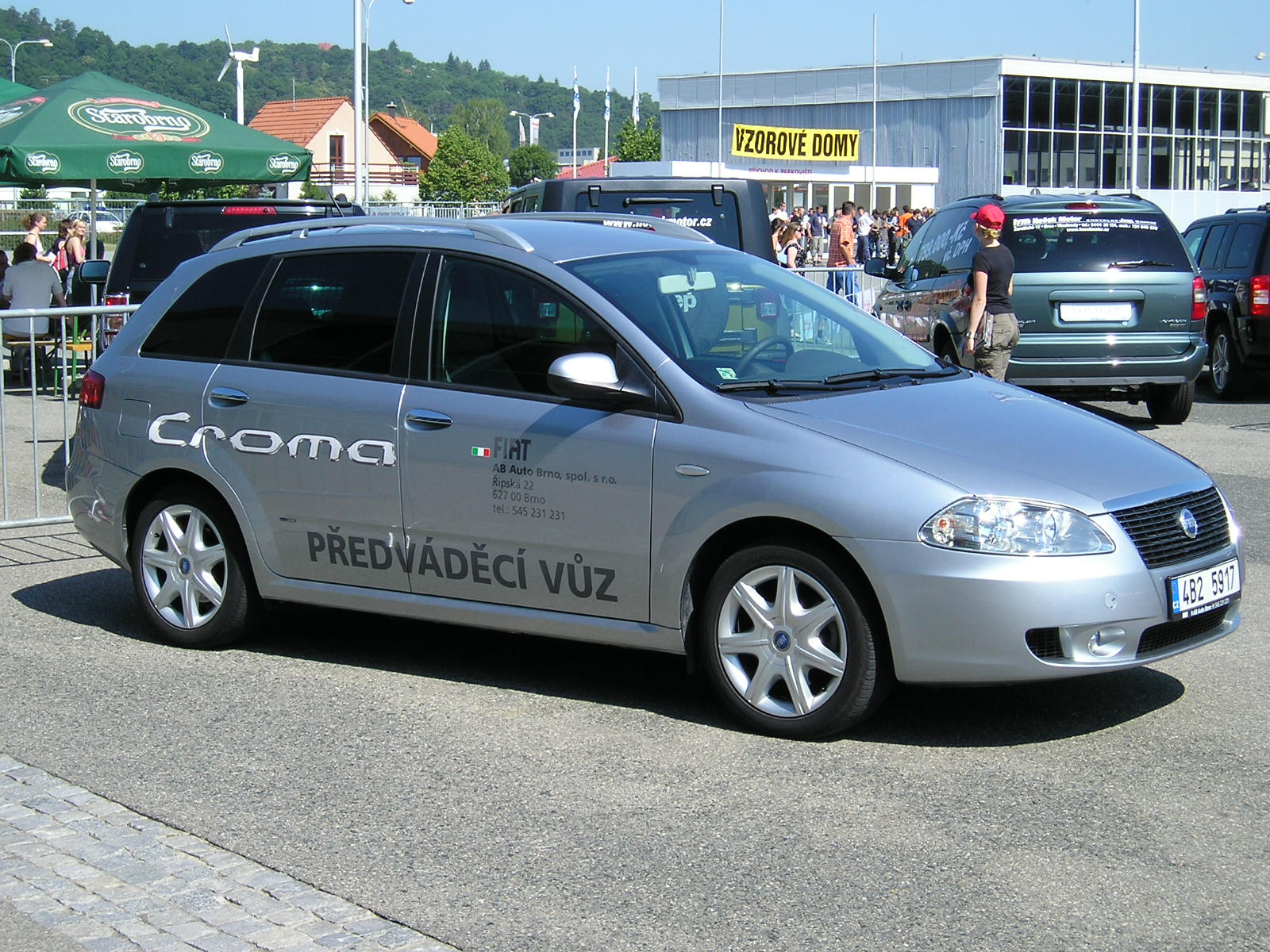 Fiat Croma na výstavišti v Brně při Autosalonu 2007